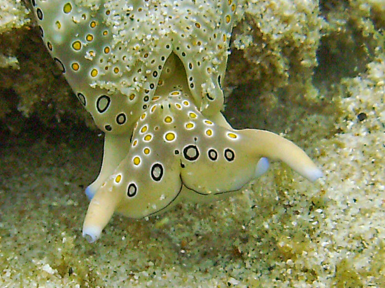 Plakobranchus ocellatus, vista de cabeza, Koh Phangan, Tailandia